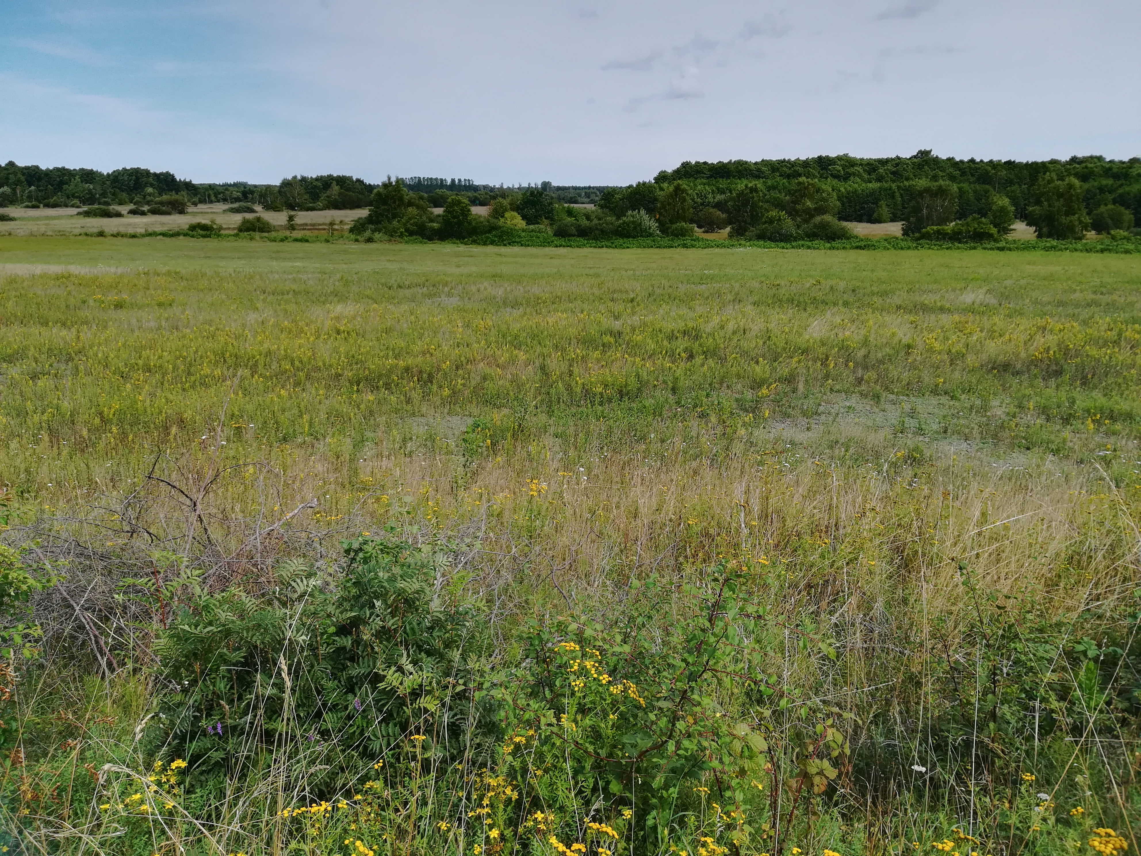 Obszar Natura 2000 "Bielawa i Bory Bażynowe" widziany ze ścieżki rowerowej Swarzewo - Krokowa, ex linii kolejowej.